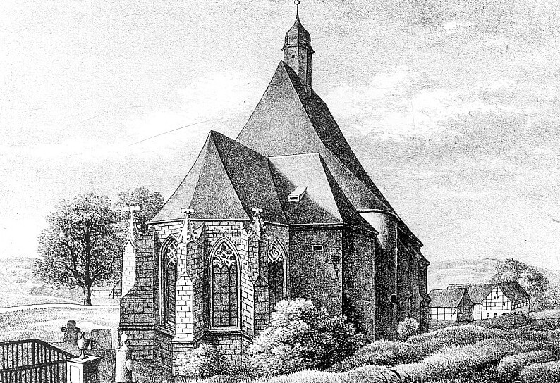 Original image description from the Deutsche Fotothek Triebischtal-Burkhardswalde. Kirche